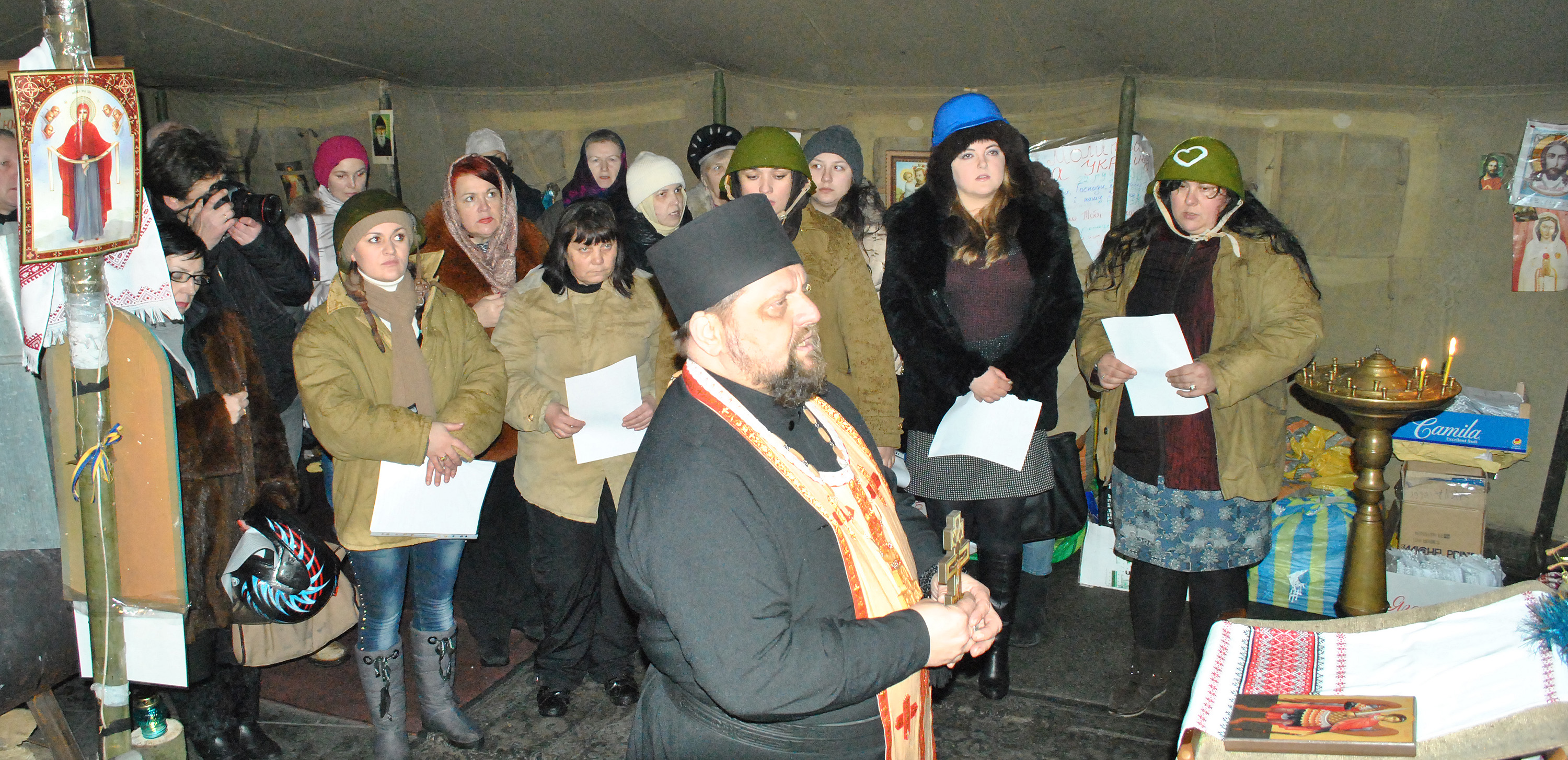 Посвячення і прийняття присяги першими членкинями 39 Жіночої сотні Самооборони Майдану в каплиці на Майдані Незалежності в Києві 10 лютого 2014 року.